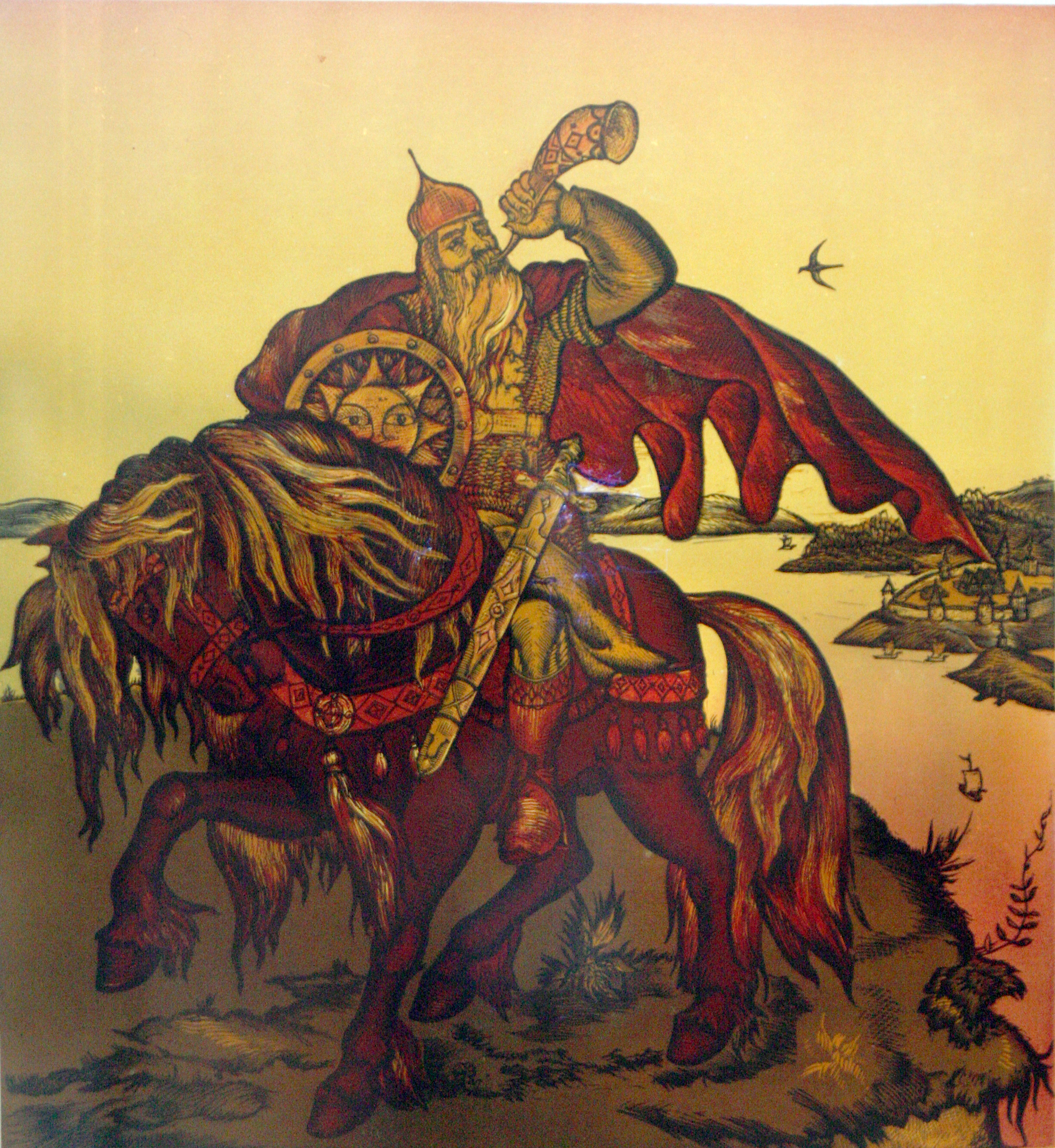 Картина «Илья Муромец», гравюра